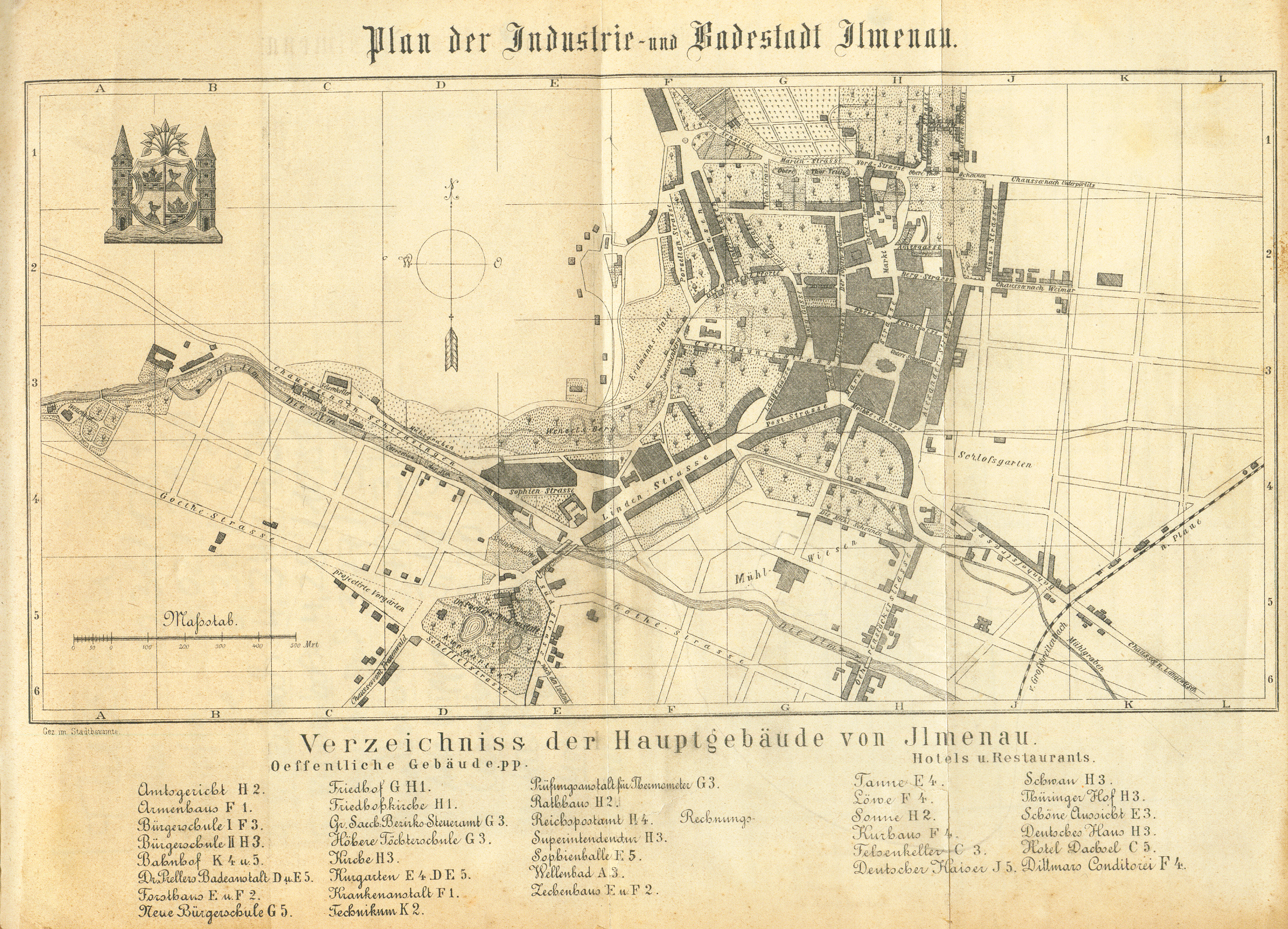 Stadtplan von Ilmenau (Thüringen) aus dem Jahr 1890. Zu beachten ist, dass der Stadtplan ungenau genordet ist und um etwa 40° gegen den Uhrzeigersinn gedreht werden muss um die exate Nordrichtung zu erhalten.